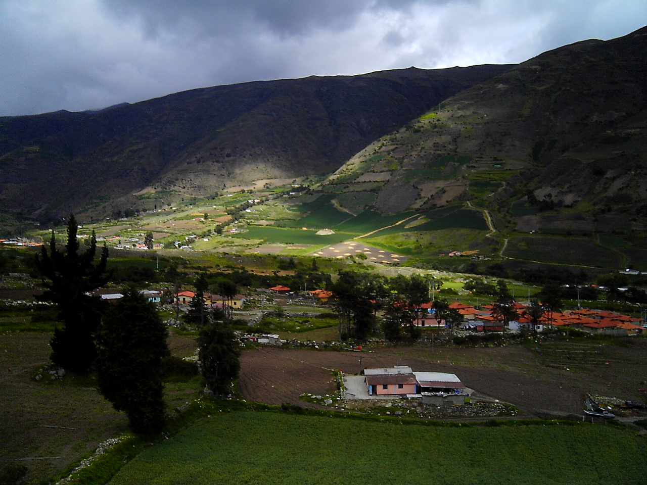 Páramo